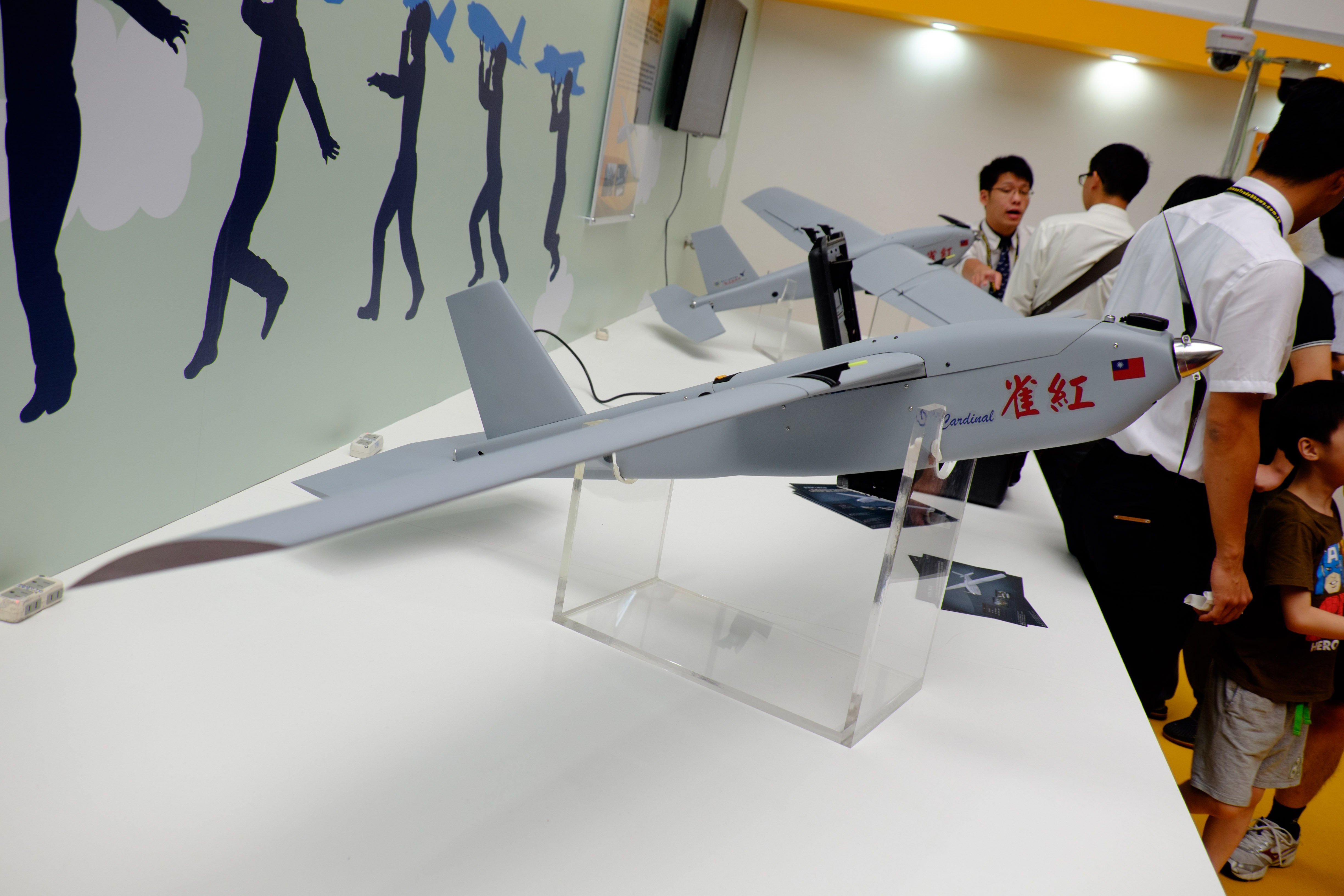 中文（台灣）: 2015台北國際航太暨國防工業展覽會第三日，國家中山科學研究院研發的紅雀小型無人機。